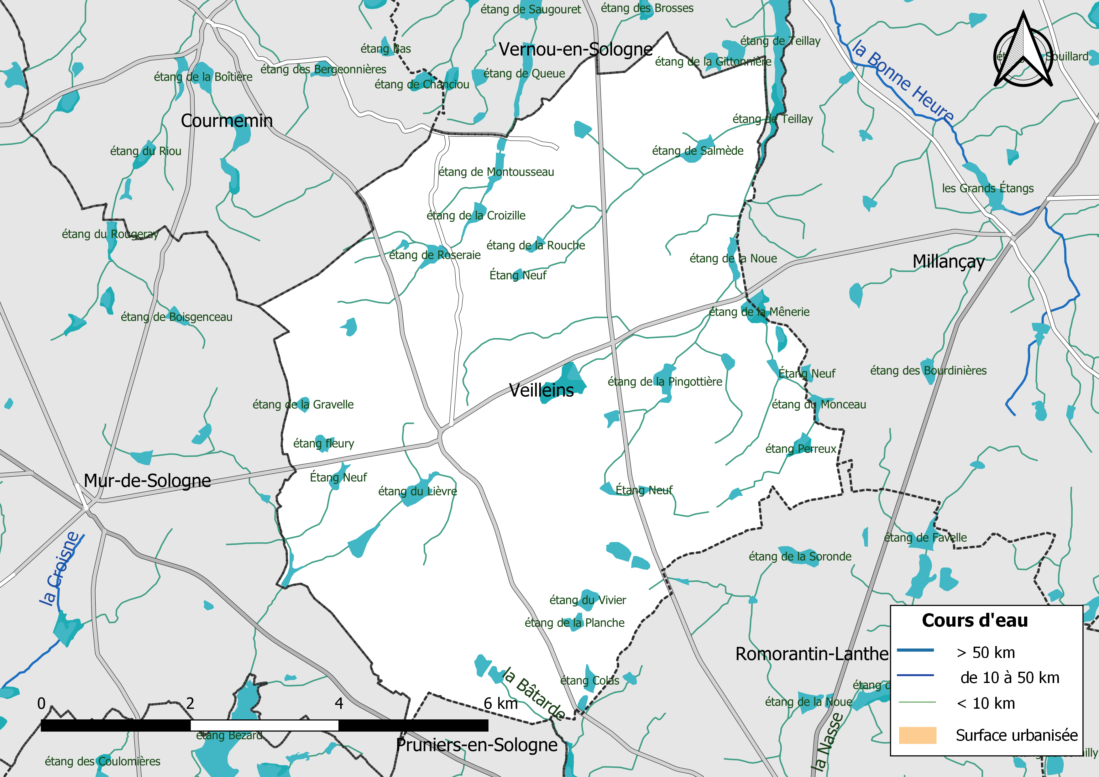 Carte du réseau hydrographique de la commune de Veilleins (Loir-et-Cher, France).